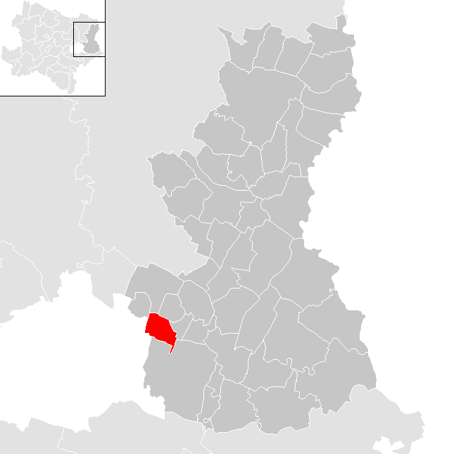 Bezirk Gänserndorf